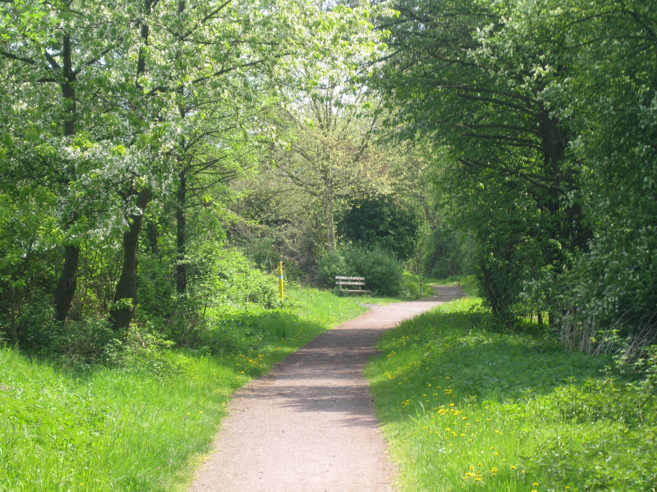 Klingbachradweg